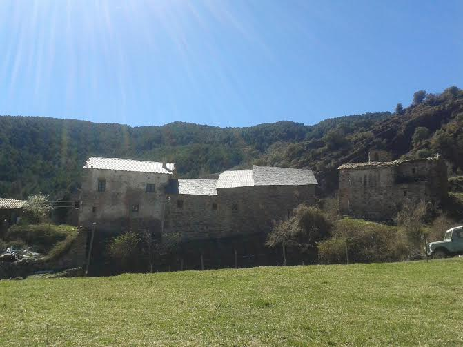 Vista de Mencui des de l'entrada per la pista de terra